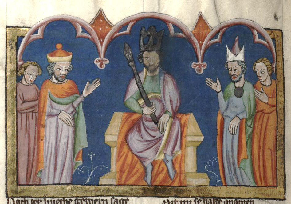 Rudolf von Ems: Weltchronik. Böhmen (Prag), 3. Viertel 14. Jahrhundert. Hochschul- und Landesbibliothek Fulda, Aa 88. Bildbeschreibung nach Martin Roland. Miniatur 196 326v Krönung Simris